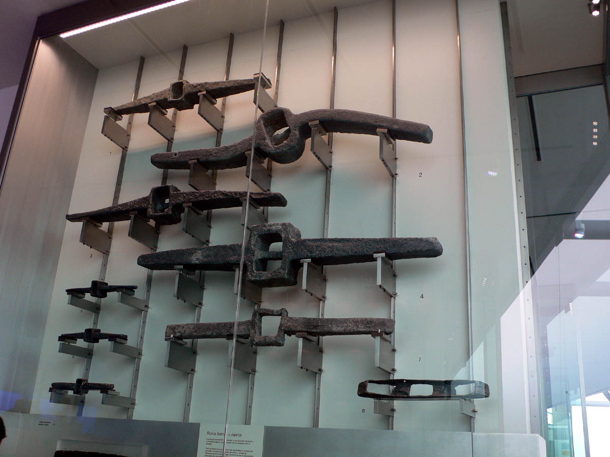 Anclas de plomo procedentes de pecios de época romana. ARQUA Museo Nacional de Arqueología Subacuática de Cartagena (España).